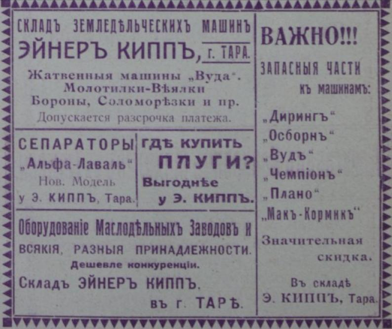 Датский поданный Эйнер Кипп.